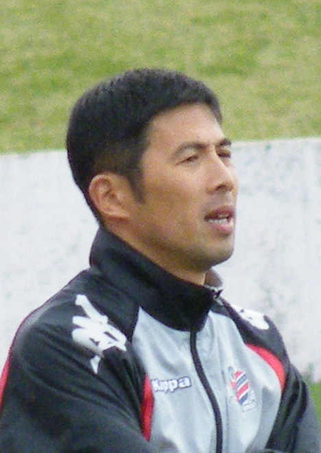 四方田修平